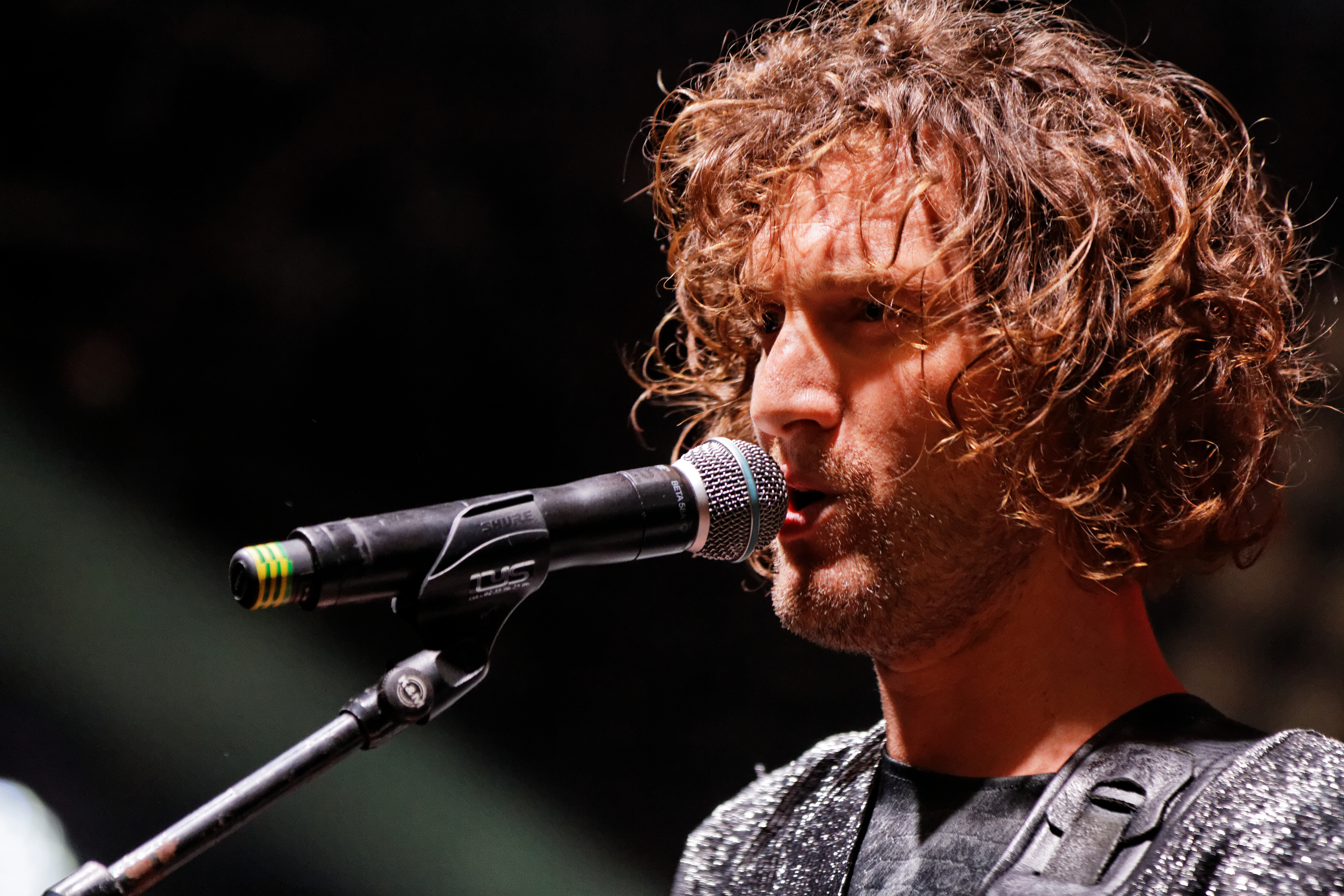 Florent Marchet en concert sur la scène Zebrock lors de la fête de l'Humanité 2014.